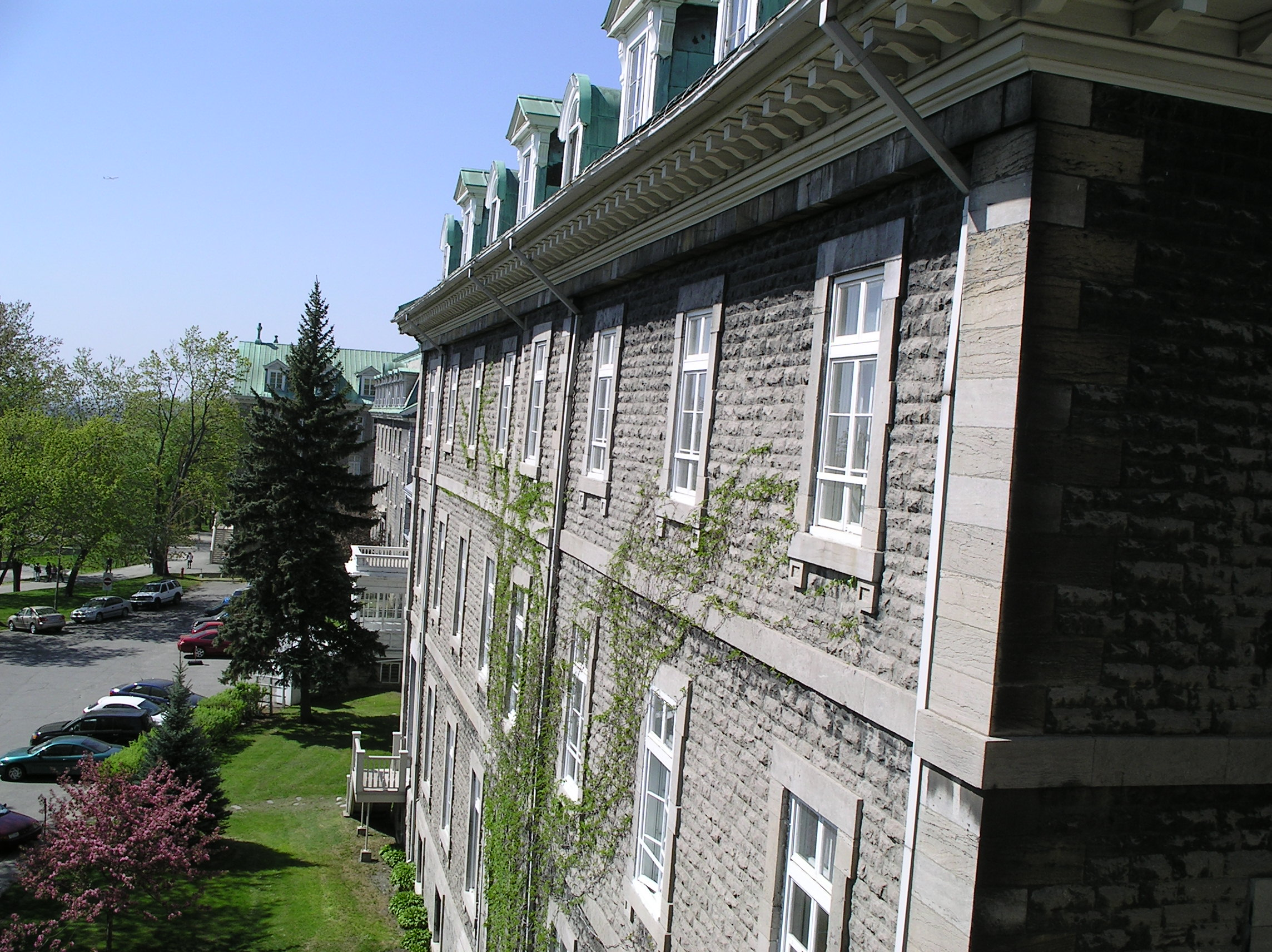 Vue sur l'école Villa Maria à partir de l'aile St-Michel (aile A)